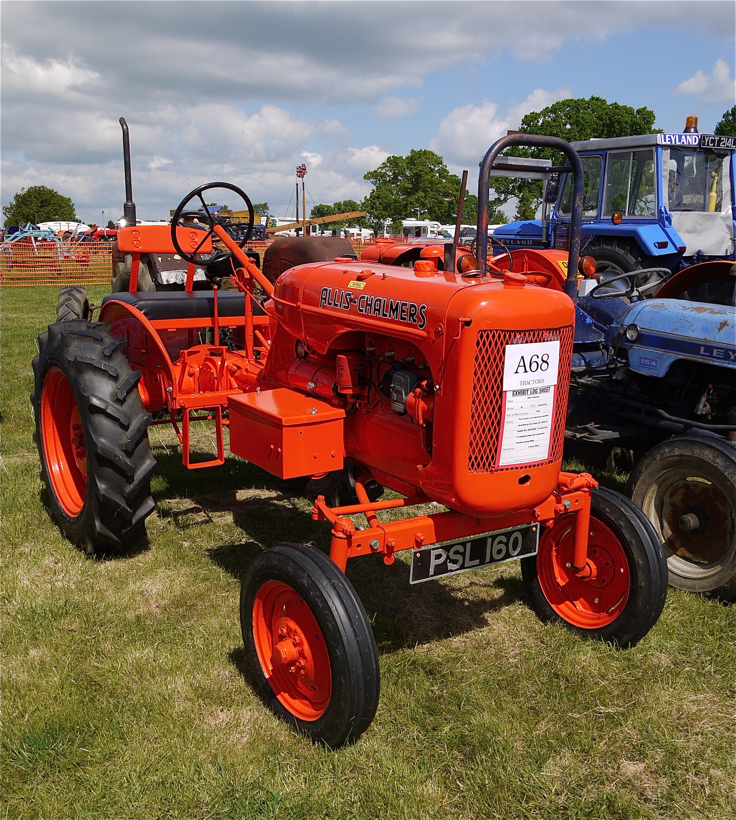 Panasonic G1 14-45 Lens